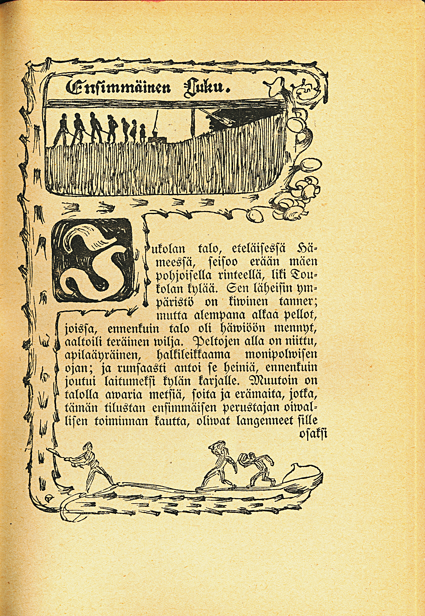 Ensimmäinen sivu Akseli Gallen-Kallelan kuvittamasta Seitsemän veljeksen laitoksesta vuodelta 1908.